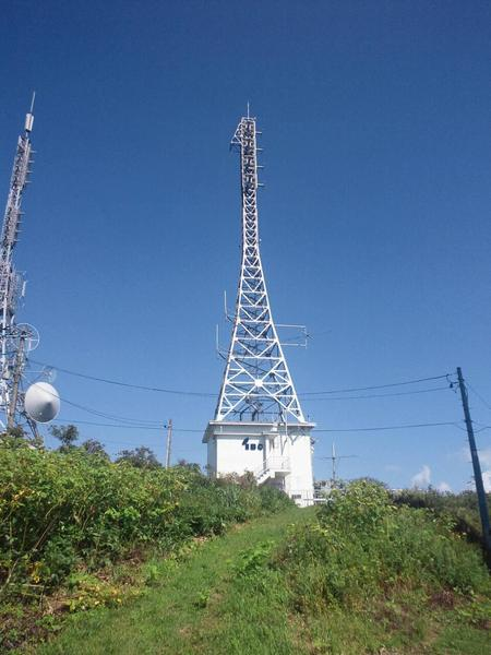 折爪岳IBCアナログテレビ送信所